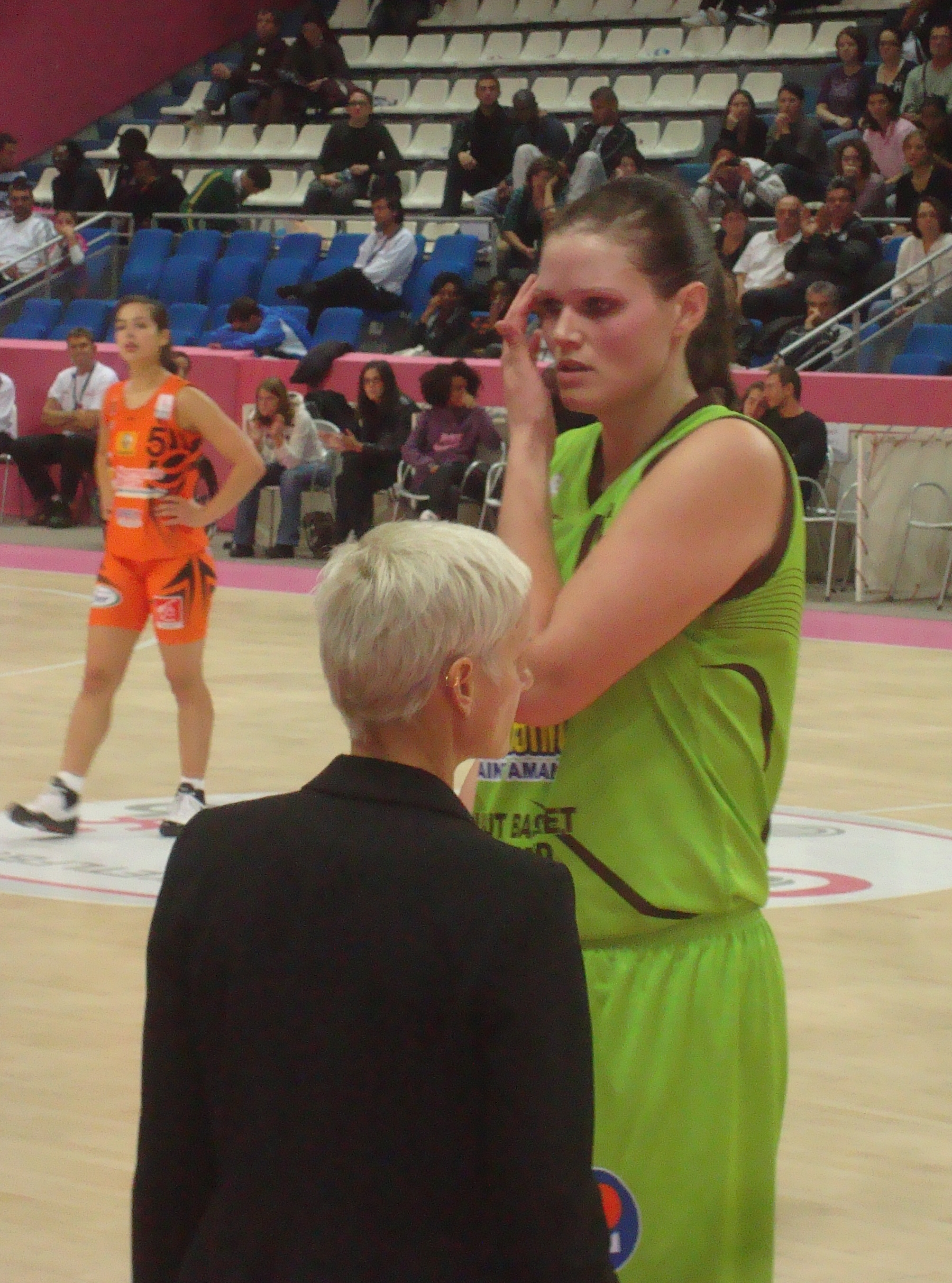 La joueuse de basket-ball américaine Alison Bales sous le maillot de Hainaut Basket.